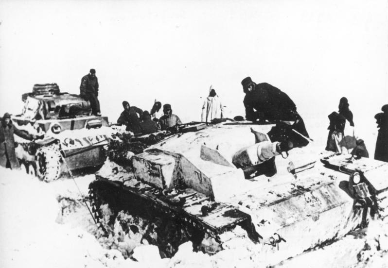 Zentralbild/CAF Der 2. Weltkrieg (1939-1945) Der Anfang vom Ende der Hitlertruppen (in der Sowjetunion) Dezember 1941 - Januar 1942